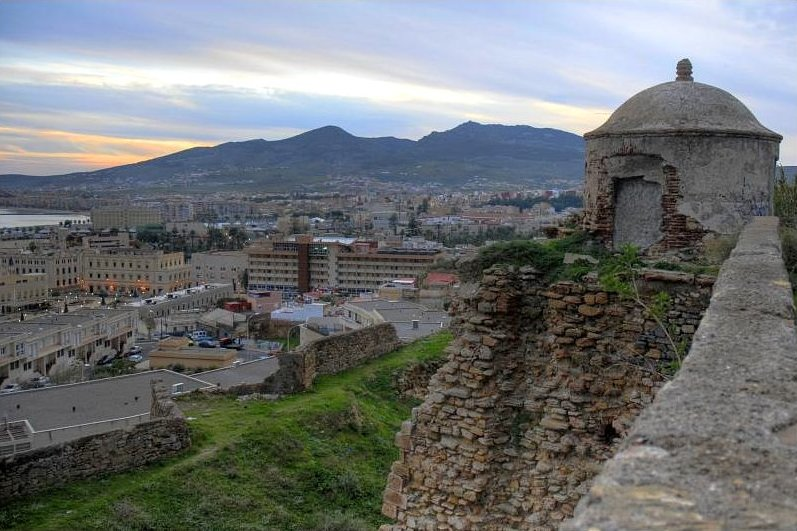 Torreón al atardecer